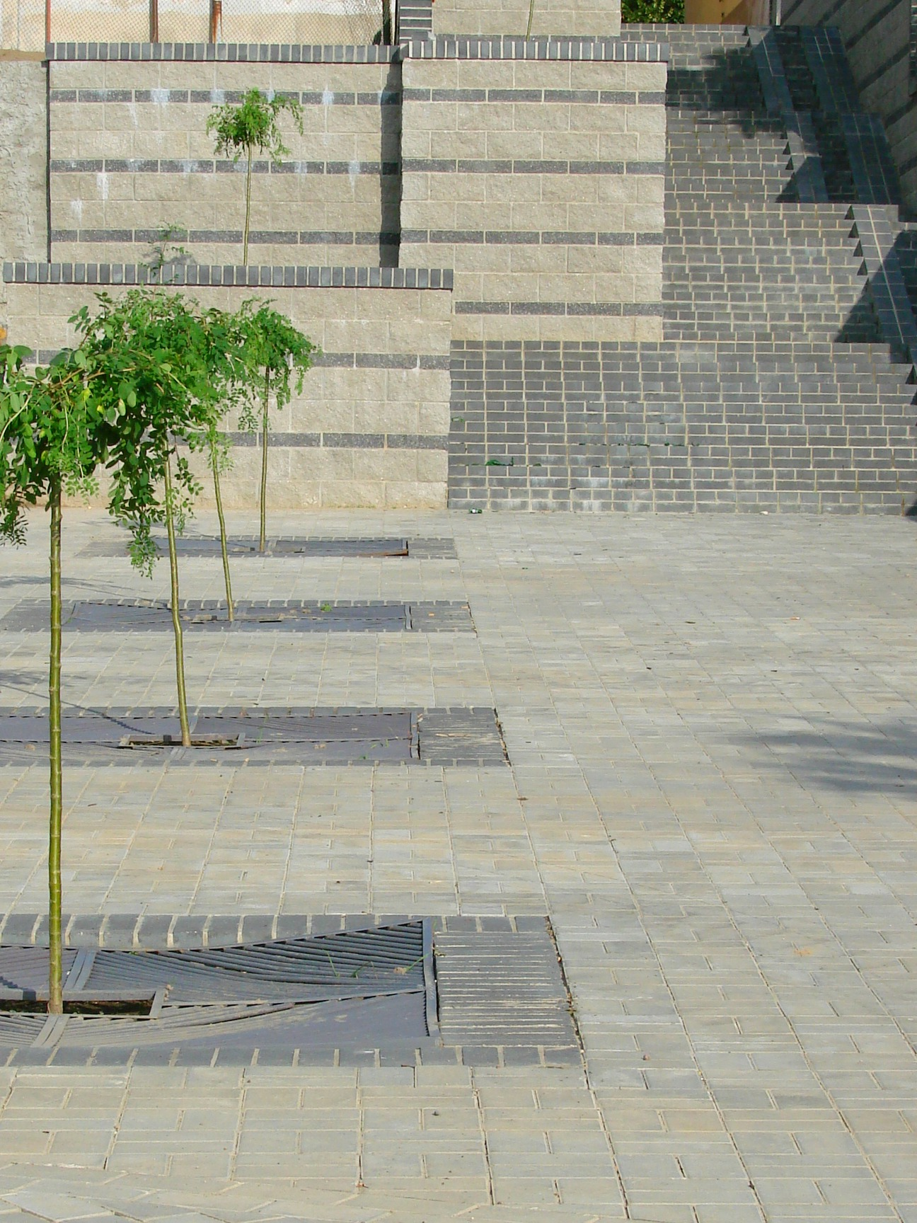 Deptak przed Sępoleńskim Molo, nad Jeziorem Sępoleńskim, w centrum; na Starym Mieście; przy ul. Jeziornej. Place in Sępólno Krajeńskie, Poland.